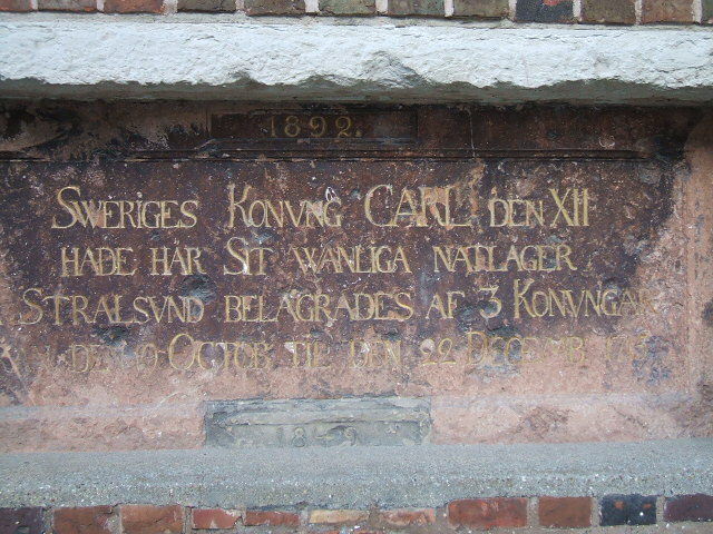 Stralsund, Germany. Das Foto zeigt eine Gedenktafel für Schwedens König Carl XII. Die Inschrift lautet: „SVERIGES KONVNG CARL DEN XII HADE HÄR SIT WANLIGA NATLÄGA DÅ STRALSUND BELAGRADES AF 3 KONVNGAR FRÅN DEN 19 OKTOB: TIL DEN 22 DECEMB: 1715“ (Deutsch): „Schwedens König Karl XII. hatte hier sein gewöhnliches Nachtlager, als Stralsund von drei Königen belagert wurde vom 1. Oktober bis zum 22. Dezember 1715.“.